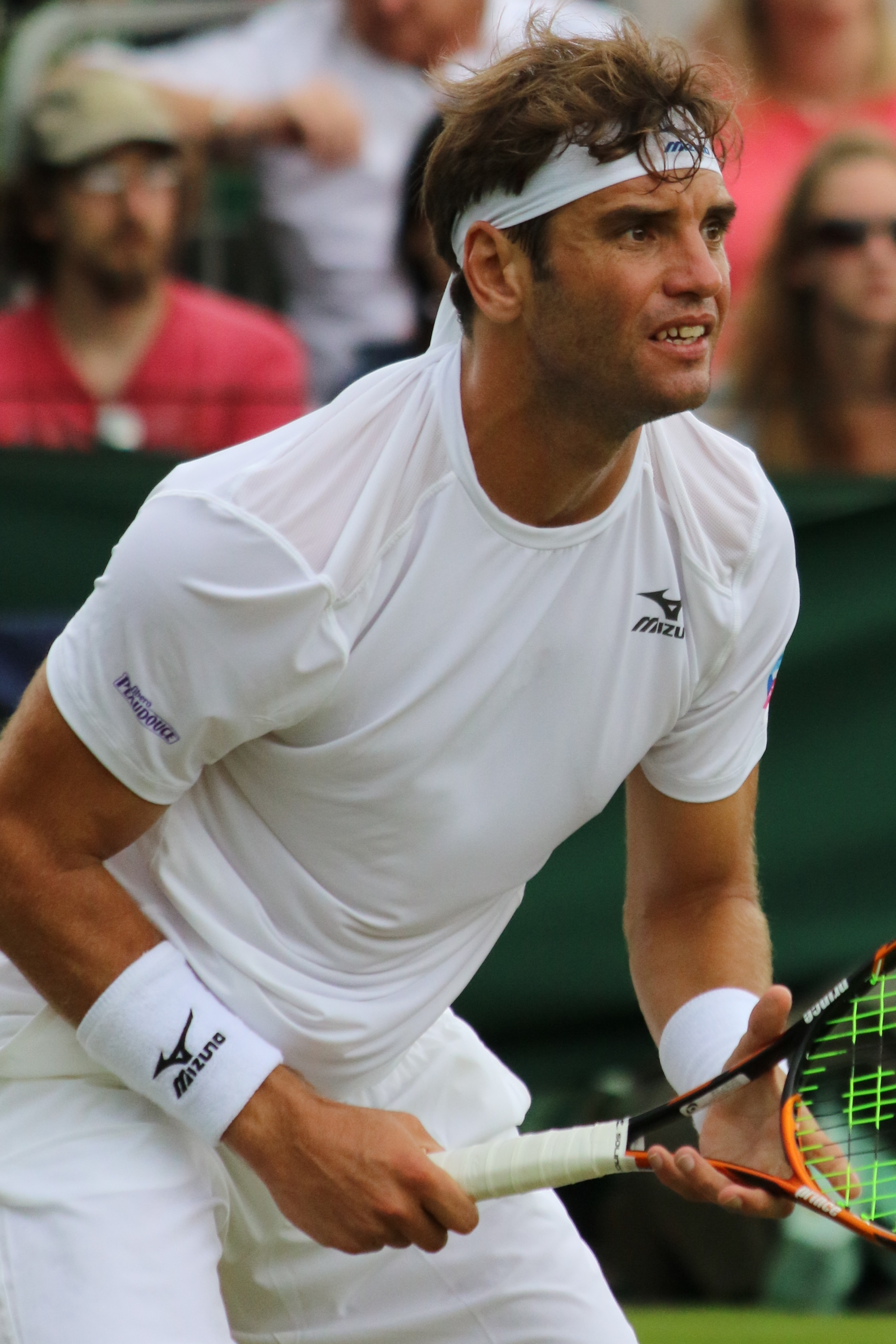 Jaziri WM17 (10)